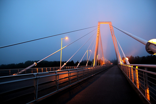 Kolbäcksbron at night